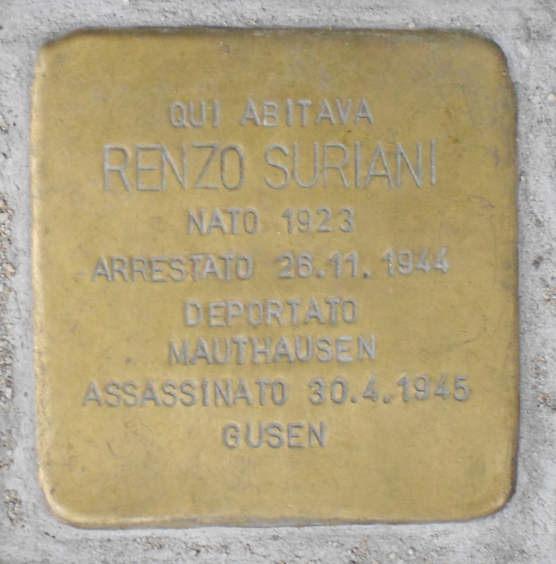 Pietra d'inciampo posata ad Avigliana per Renzo Suriani